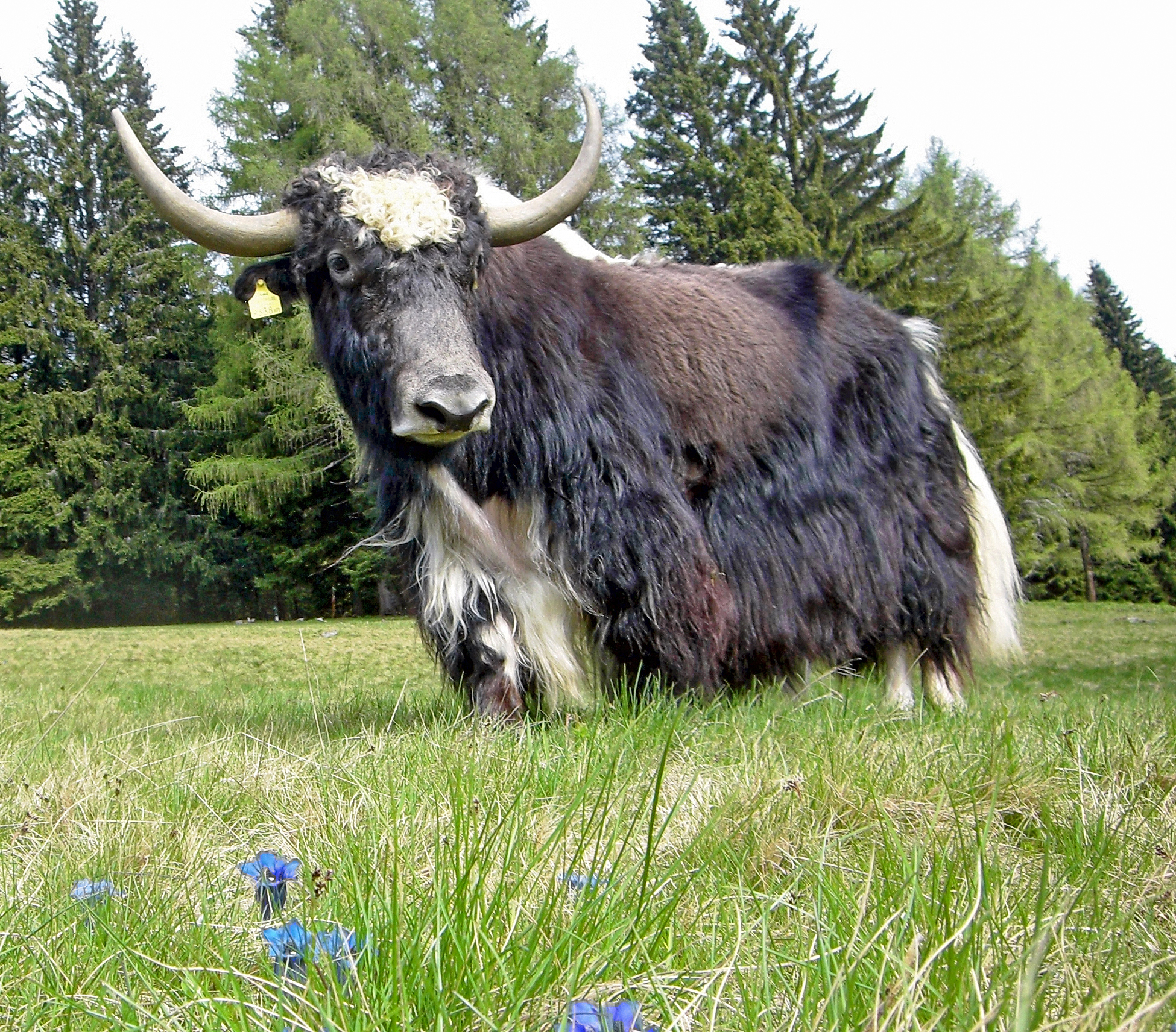 3 Jahre alter Jungbulle. Yakzucht Pongratz ( auf der Koralpe, Steiermark, Österreich